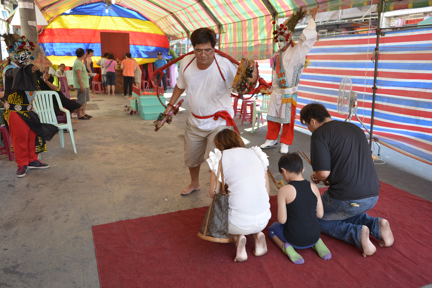 中文（台灣）: 屏東東港東福殿城隍廟舉行之草人改運